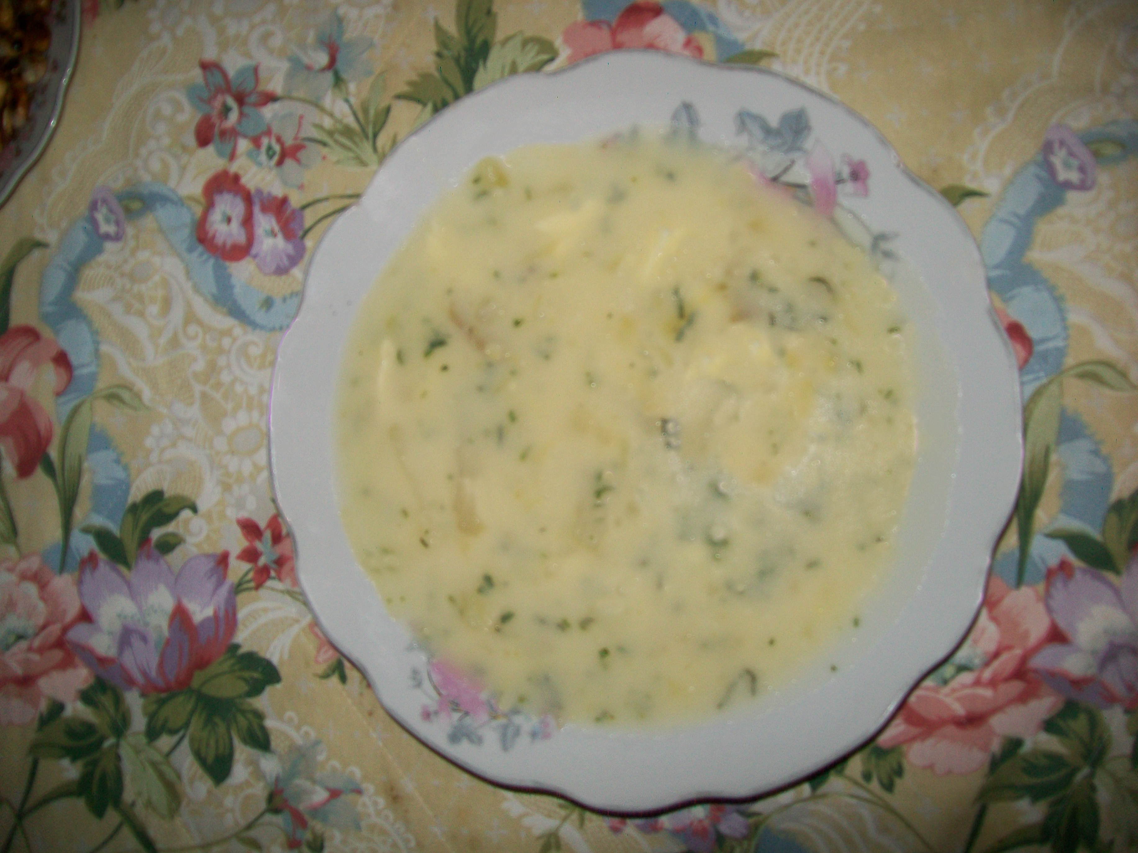 Gastronomía de Ocros Nombre: Papa Cashqui País: Perú Fotógrafo:© Edgar Amador Espinoza Montesinos